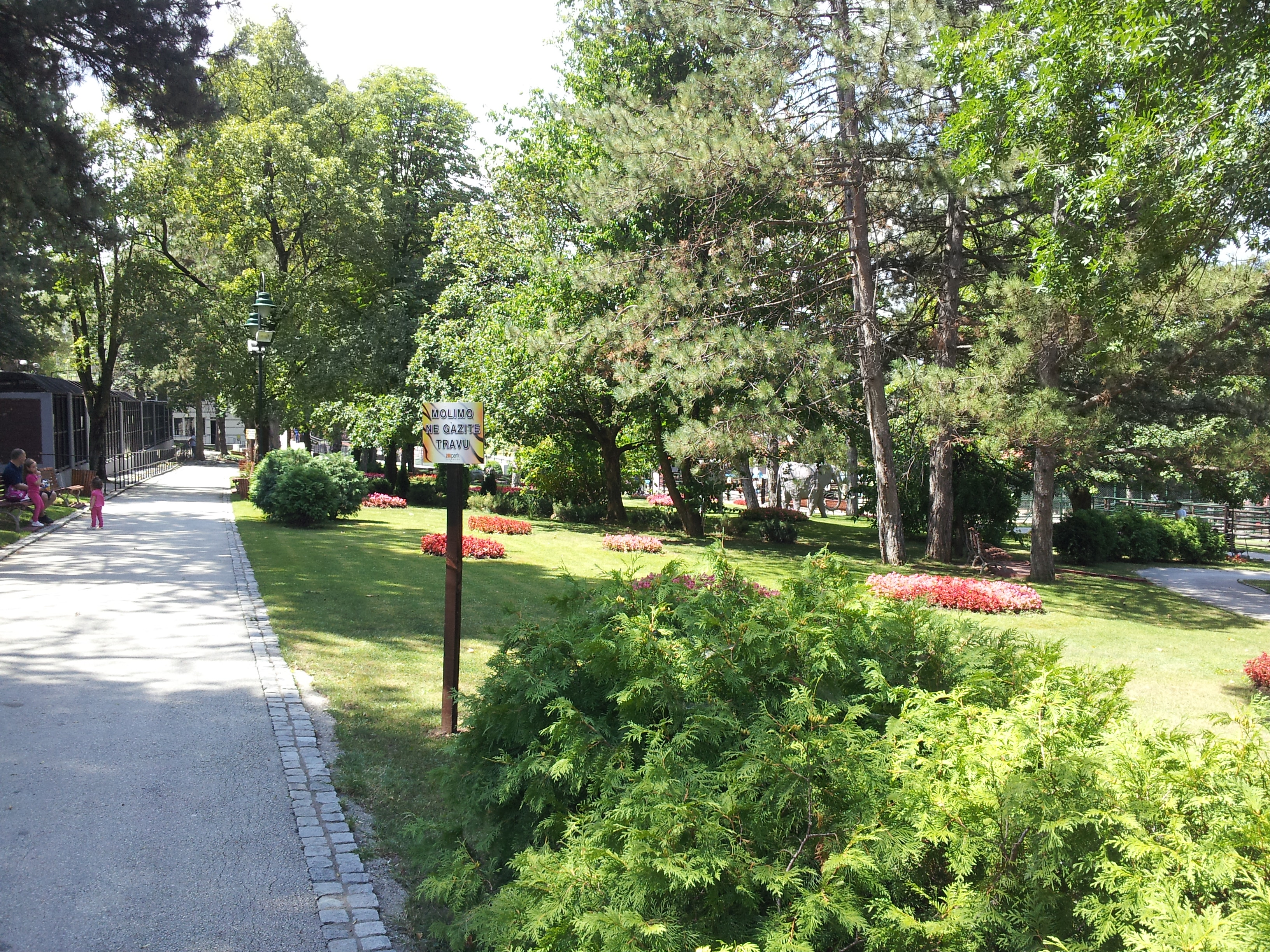 zoo de la ville de jagodina serbie